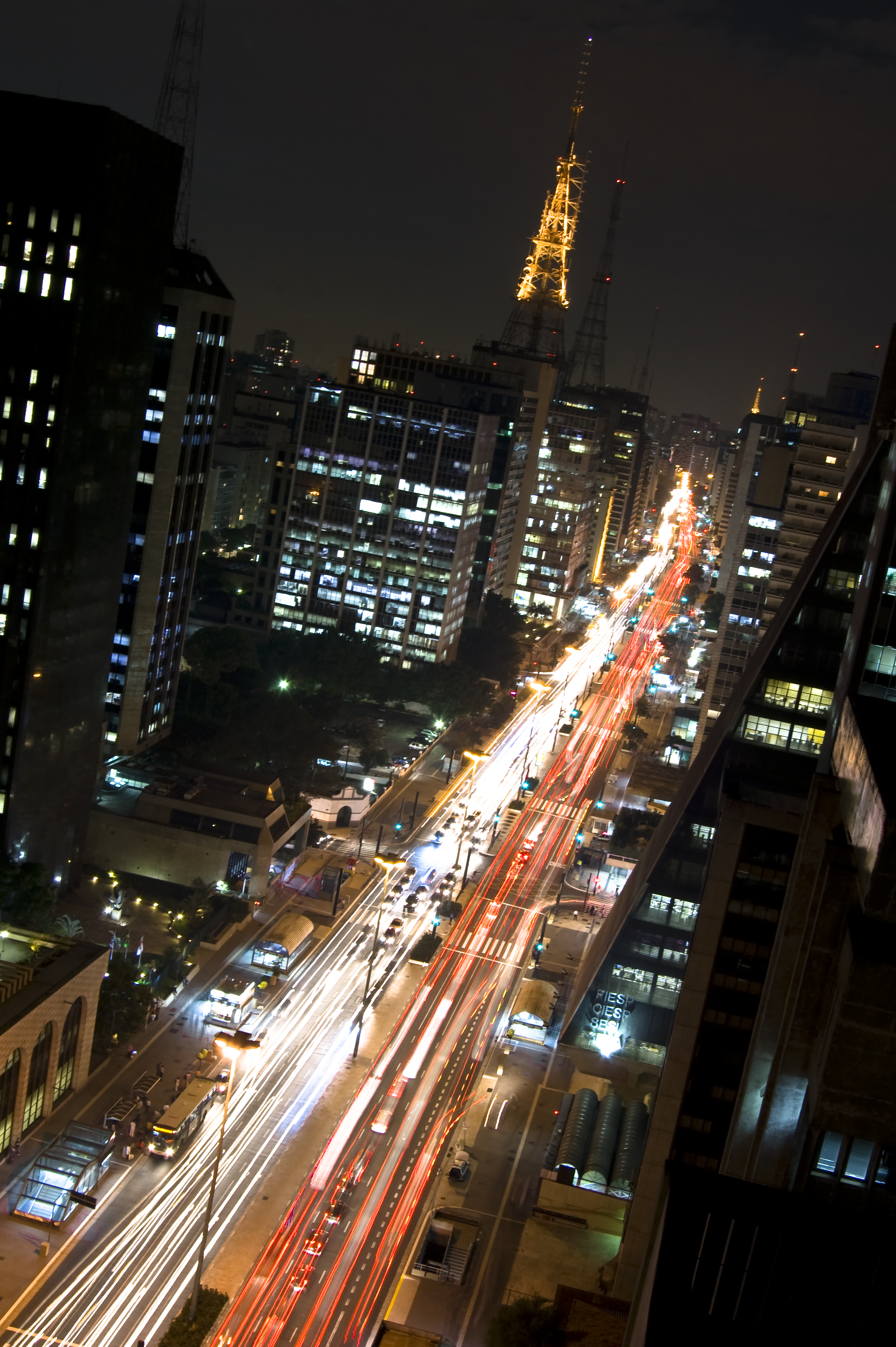 Avenida Paulista, em São Paulo, Brasil